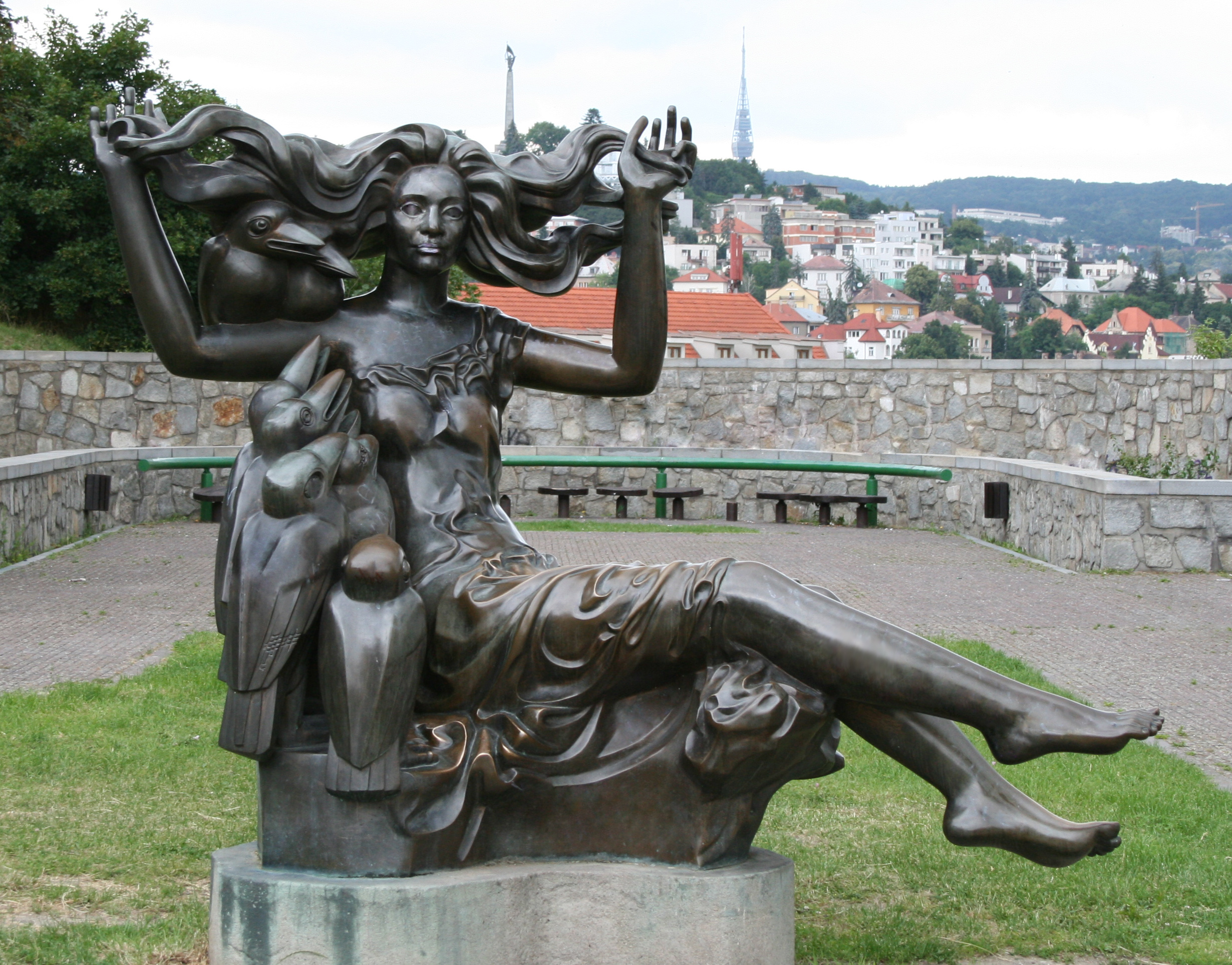 V blízkosti bratislavských hradných múrov je bronzová plastika Bosorky alebo tiež aj Dievčaťa s havranmi